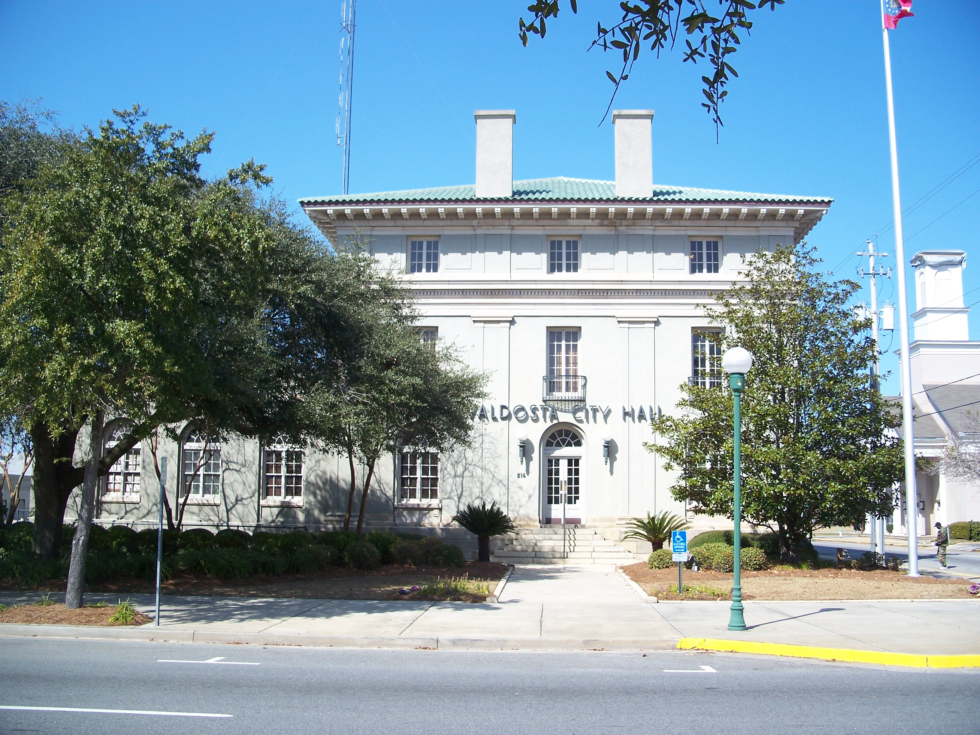 Valdosta, Georgia: Valdosta Commercial Historic District: Valdosta City Hall